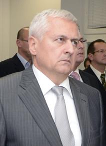 Richard Demovič